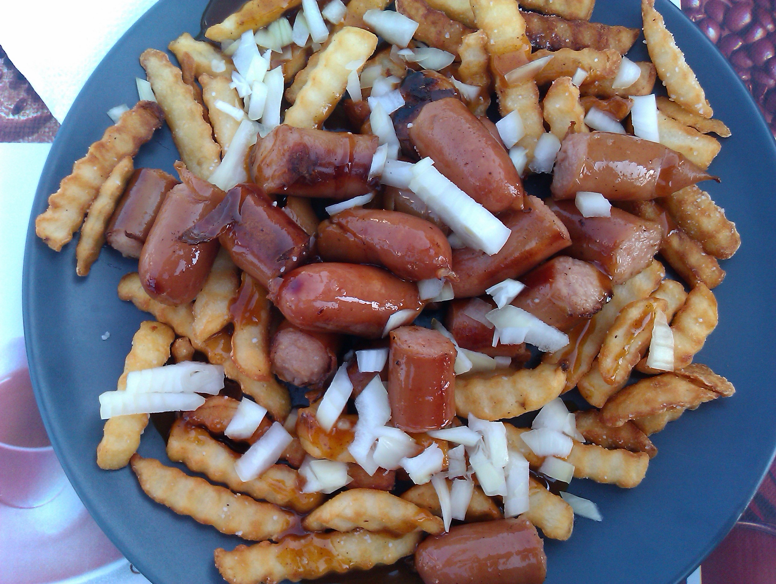 Pølsemix fra Danmark